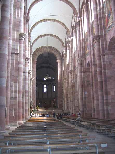 Sujet:Speyer Doum bannen Source: "GNU-FDL"